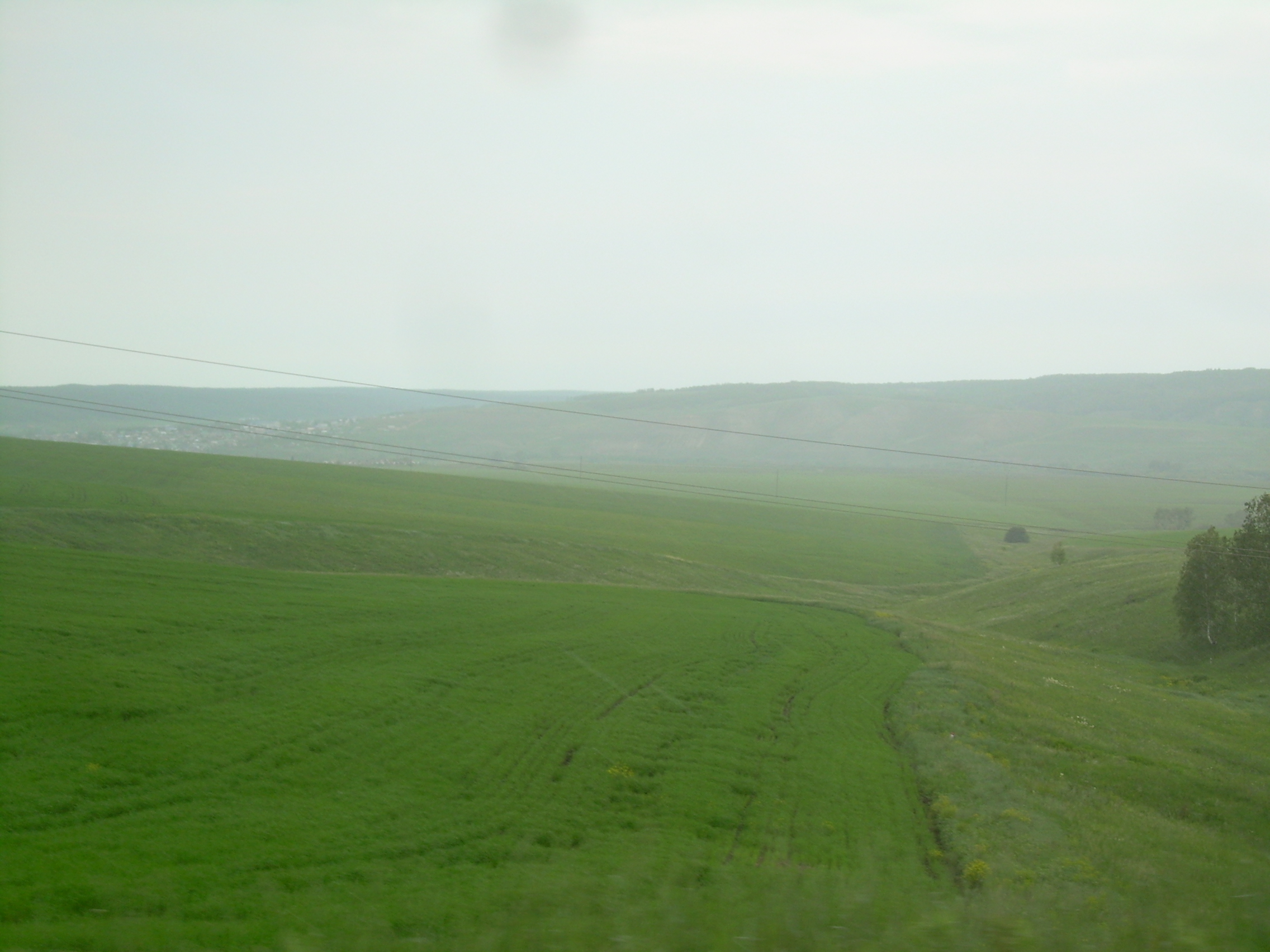 Поле в тумане